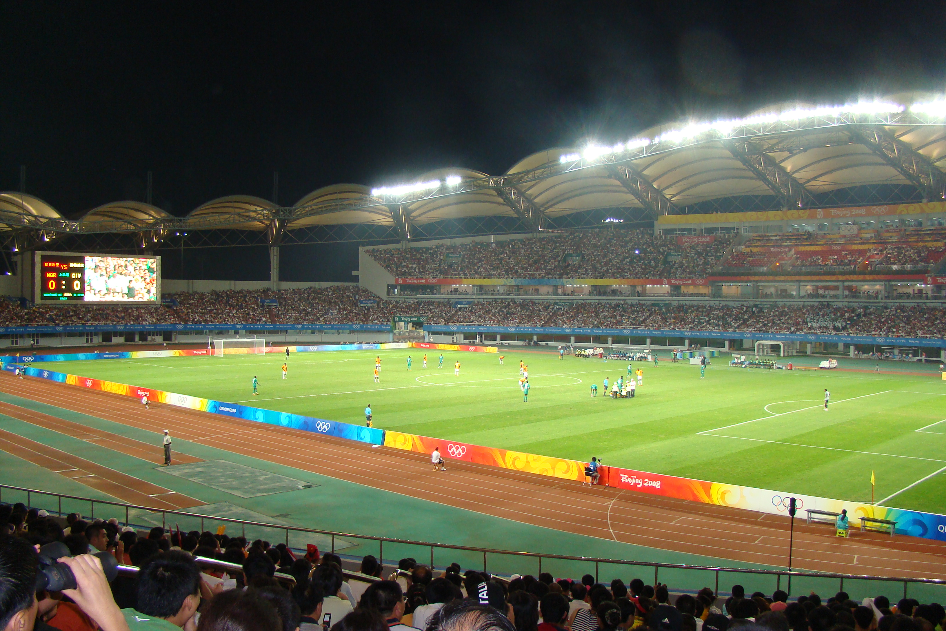 秦皇岛奥体中心（尼日利亚—科特迪瓦）